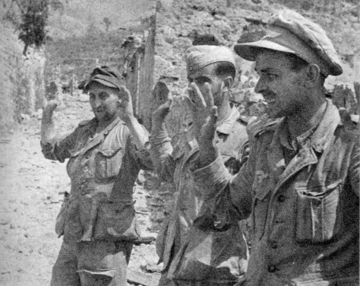 German snipers taken prisoners in Piedimonte